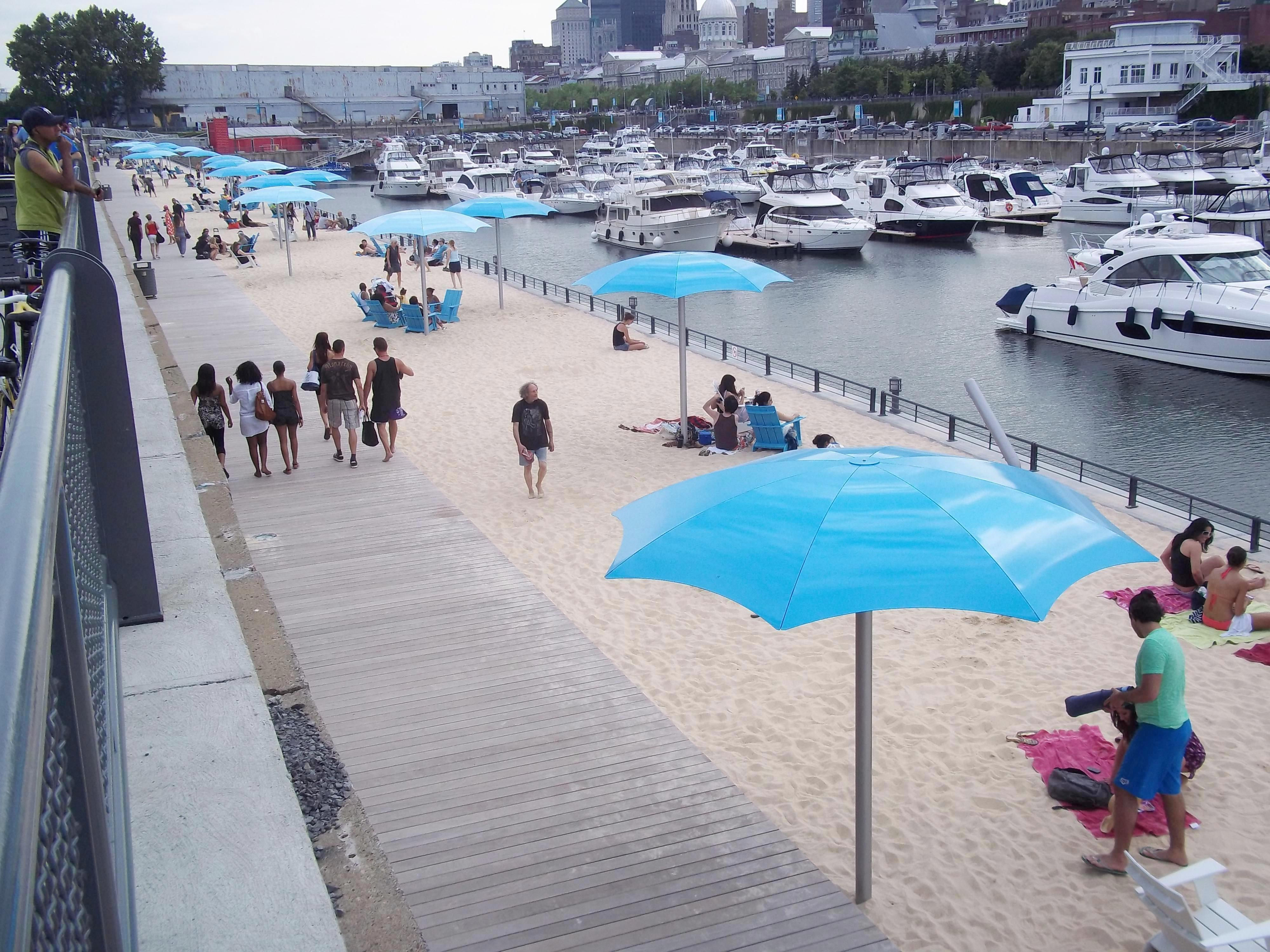 Située à quelques pas du quartier historique, la plage urbaine du Vieux-Port de Montréal offre une ambiance de vacances avec son sable fin, ses chaises, ses parasols et la fraîcheur de ses brumisateurs.